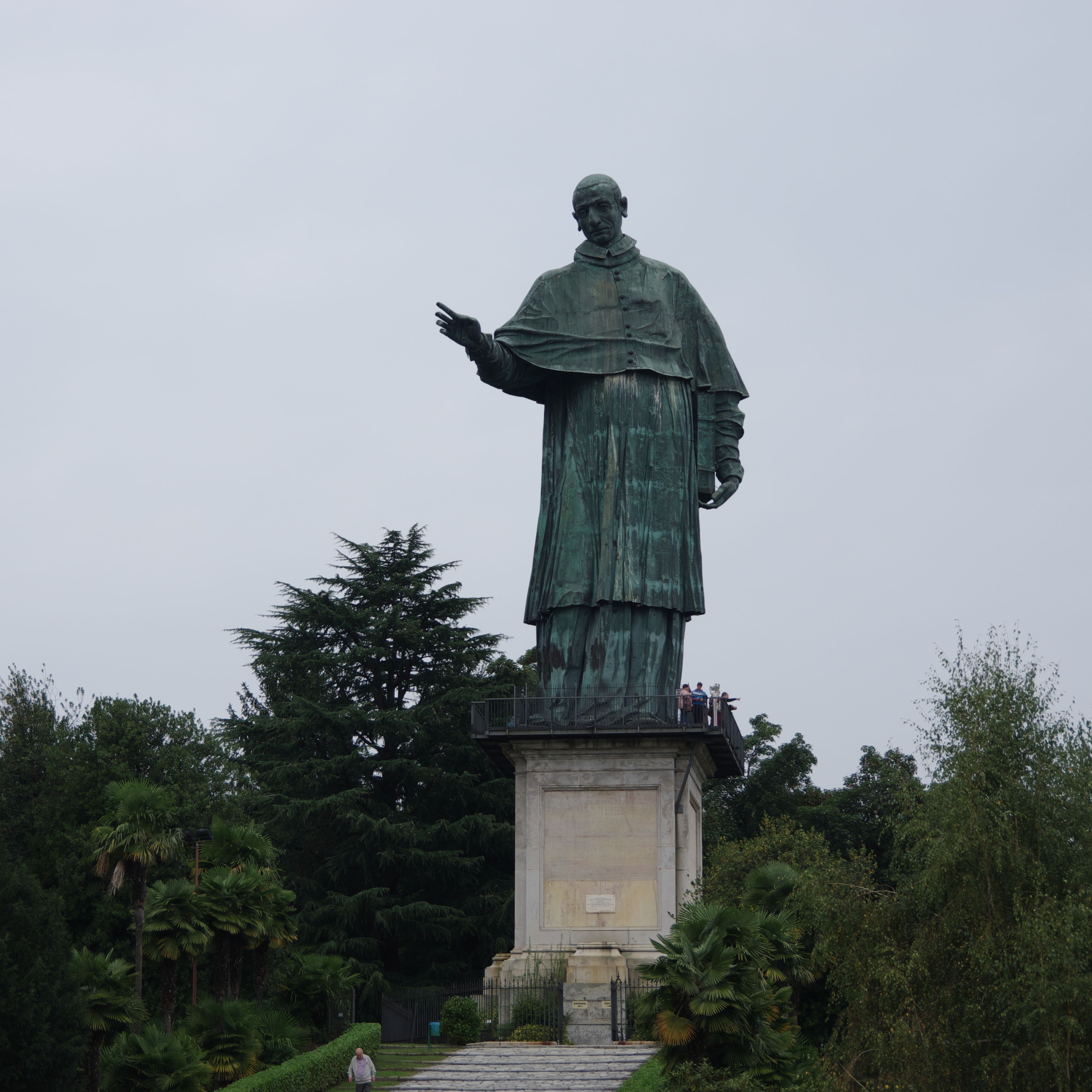 Arona im Piemont in Italien. Die Statue von Karl Borromäus, geschaffen von Bernardo Falcone, befindet sich oberhalb des Ortes.